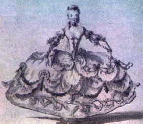 Портрет Марии Салле, танцовщицы и балетмейстера XVIII века